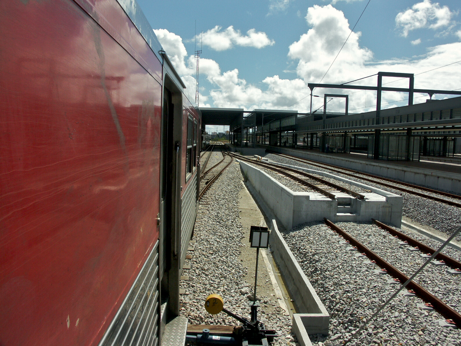 a bordo do Regional 5114 Sernada do Vouga - Aveiro. Tipo: EC Estação de Concentração Local: Aveiro Linha do Norte, PK 272 %u2022 Linha do Vouga, PK 34 Data e hora: 18 de Agosto de 2006 15h13